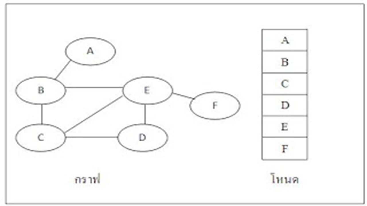 กราฟไม่ระบุทิศทาง